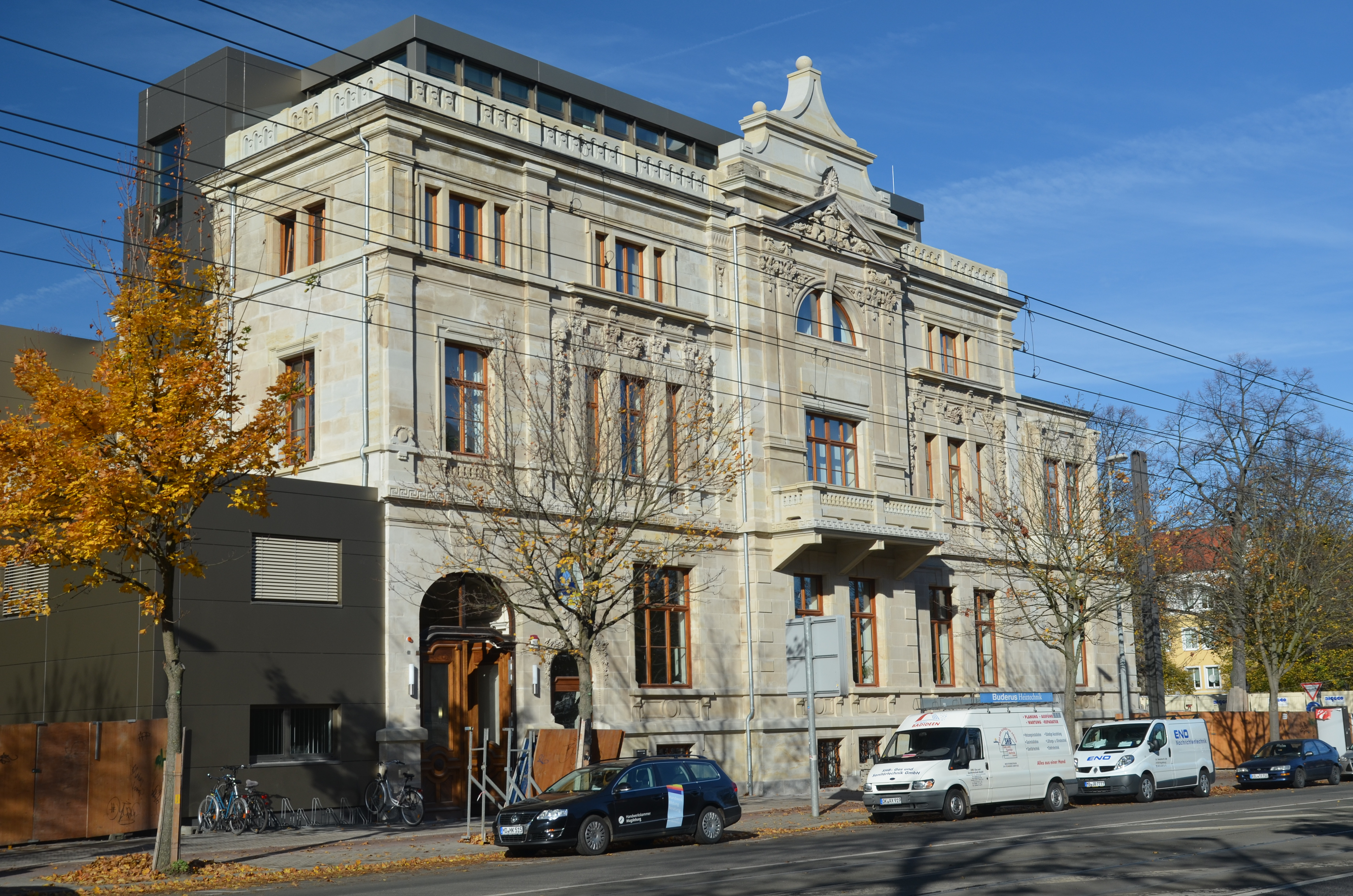 Haus des Handwerks in Magdeburg, Gareisstraße 10, erbaut 1901 als Villa Rudolph